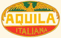 Logo van Aquila Italiana, een bedrijf dat bestond tussen 1905 en 1917. Overgenomen van de Spaanse wikipedia.